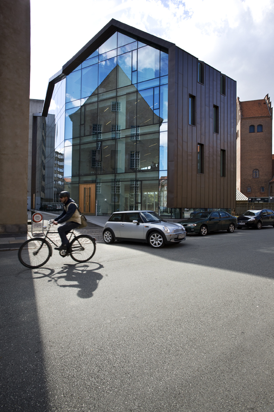 The office building of KOMBIT on Islands Brygge in Copenhagen